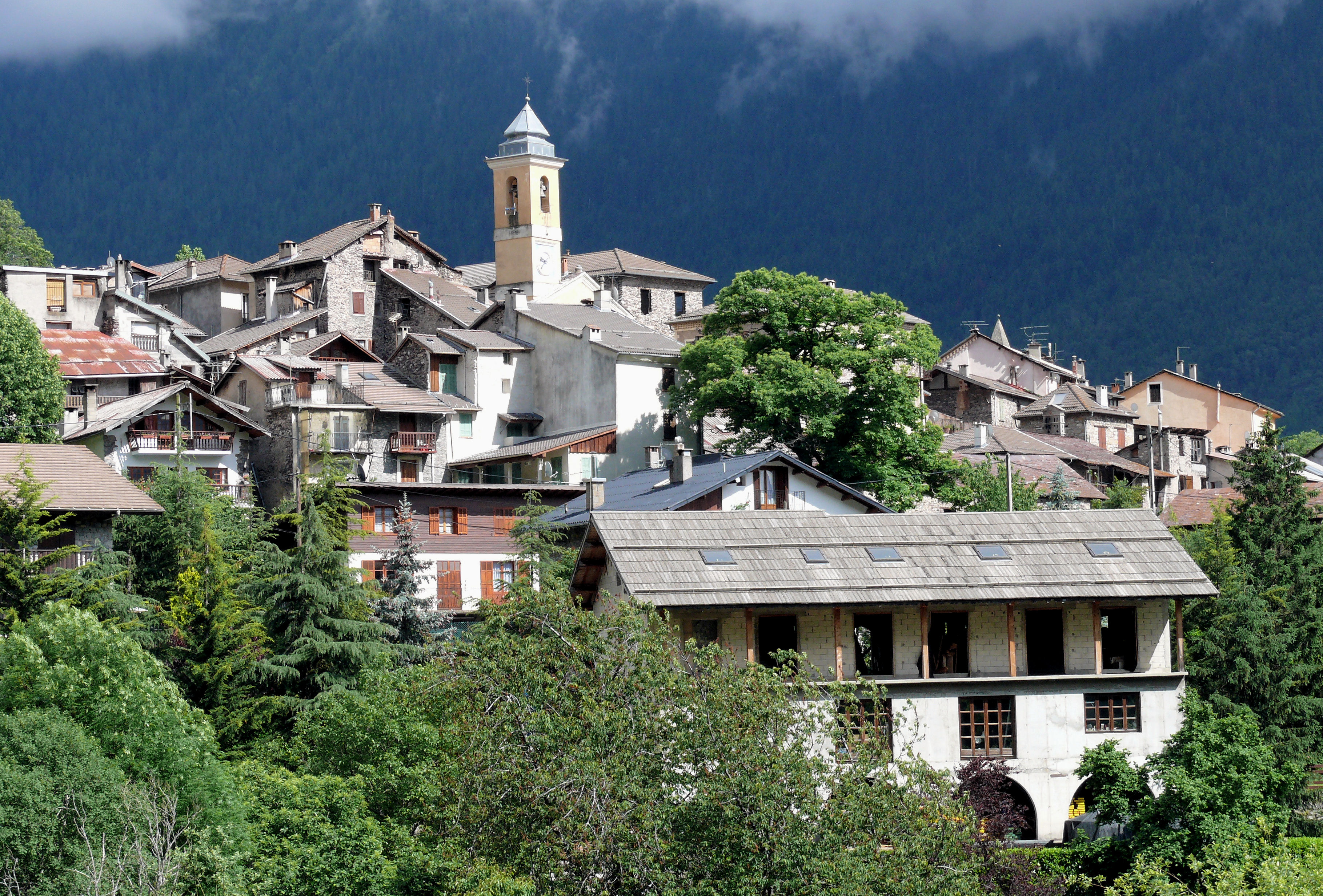 Valdeblore - La Bolline - Vue du village avec le clocher de la chapelle des Pénitents Blancs